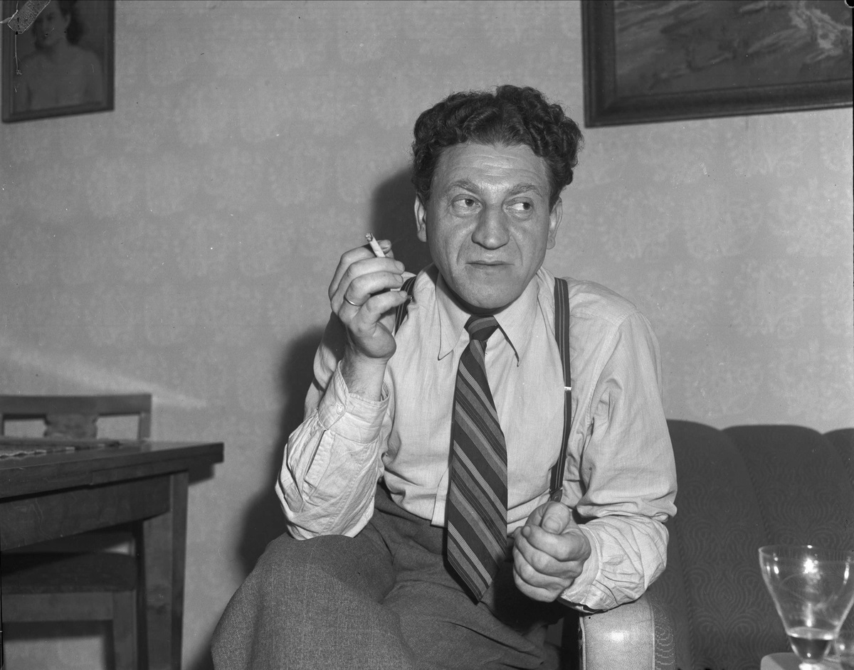 Moritz Nachtstern, norsk holocaust-overlevende og typograf.